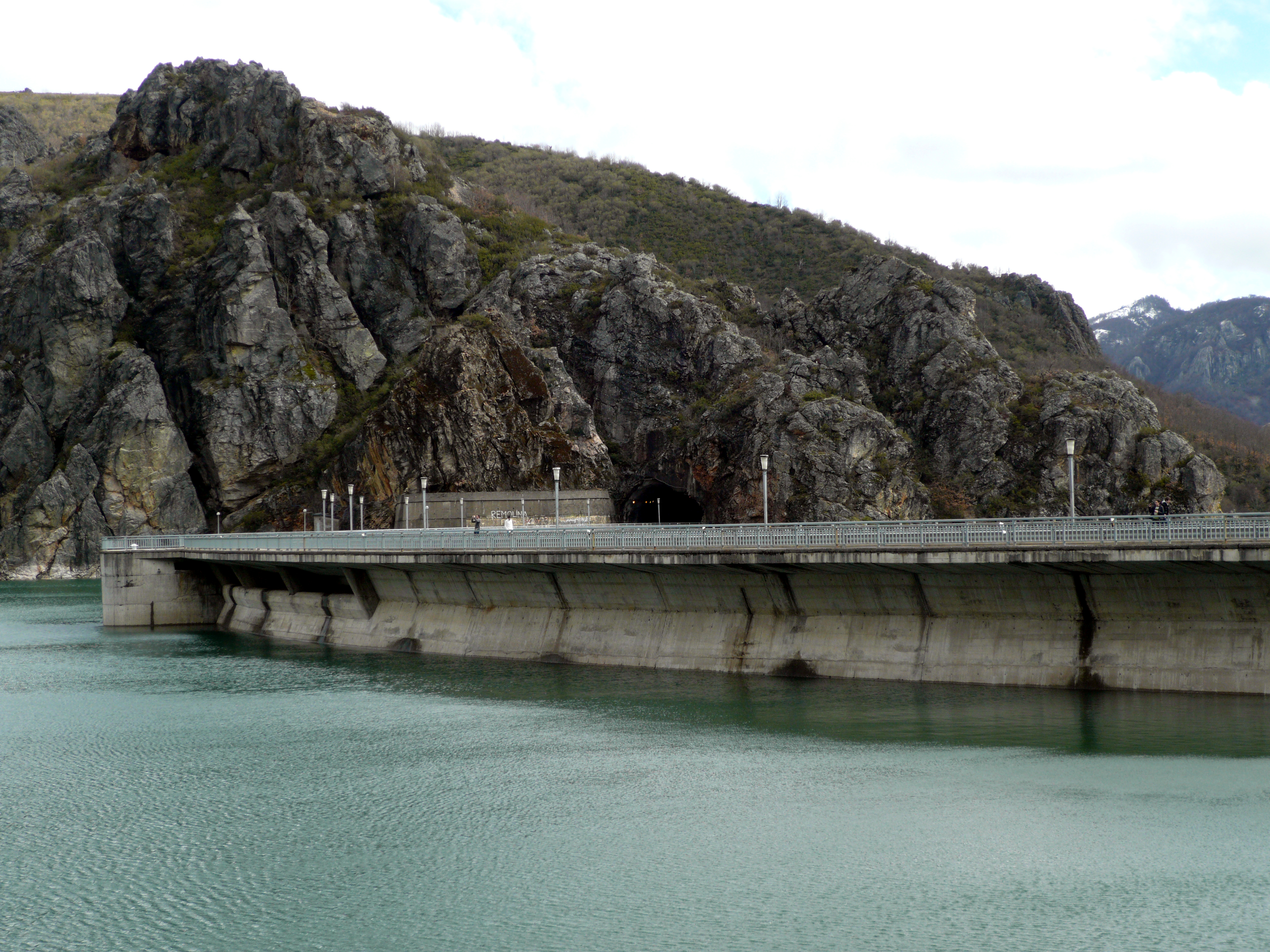 Presa del embalse de Riaño, provincia de León, Castilla y León, España.